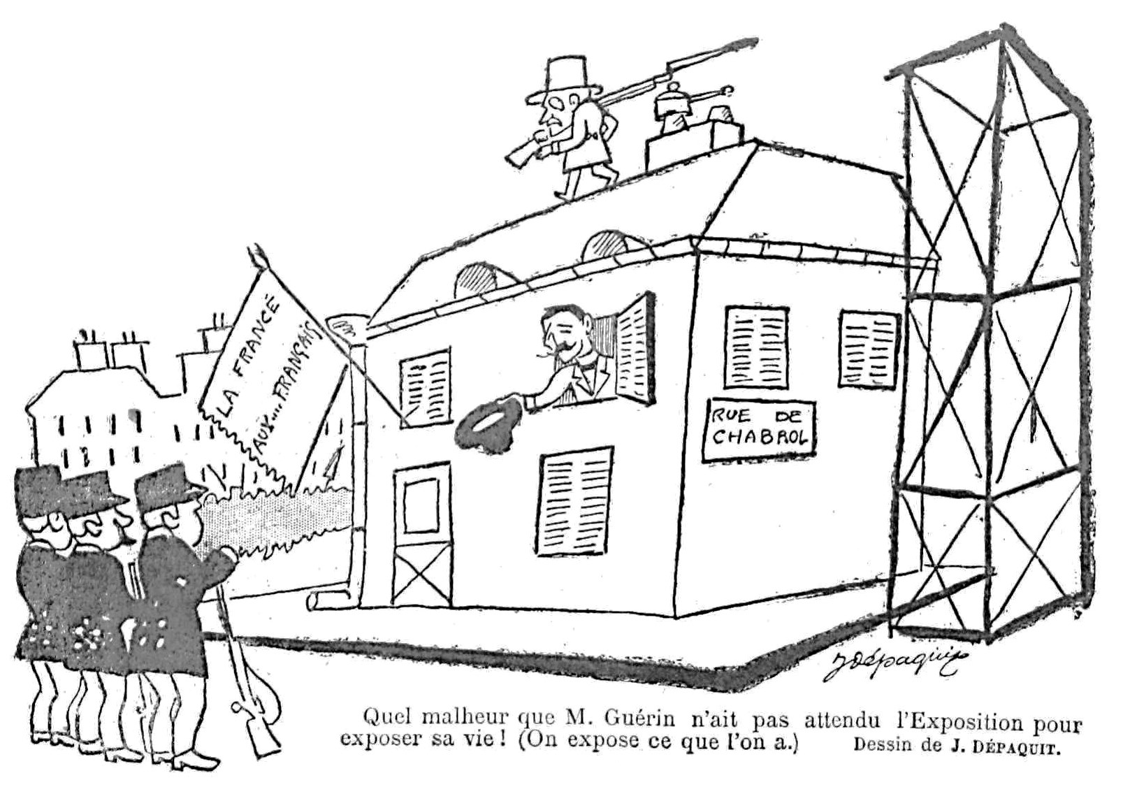 Dessin de J. Dépaquit à propos de Jules Guérin et de l'épisode de "Fort Chabrol".